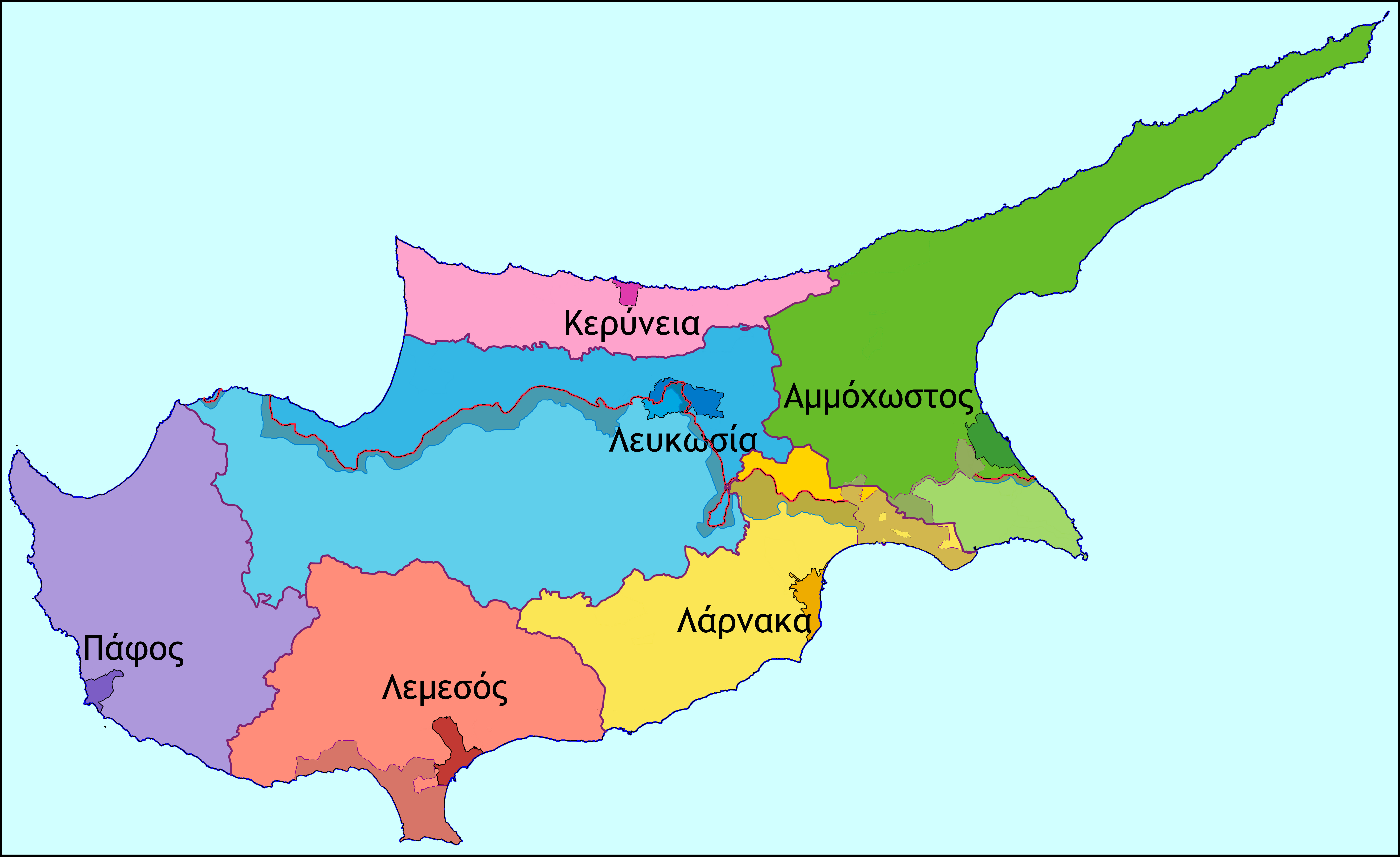 Χάρτης των επαρχιών της Κύπρου